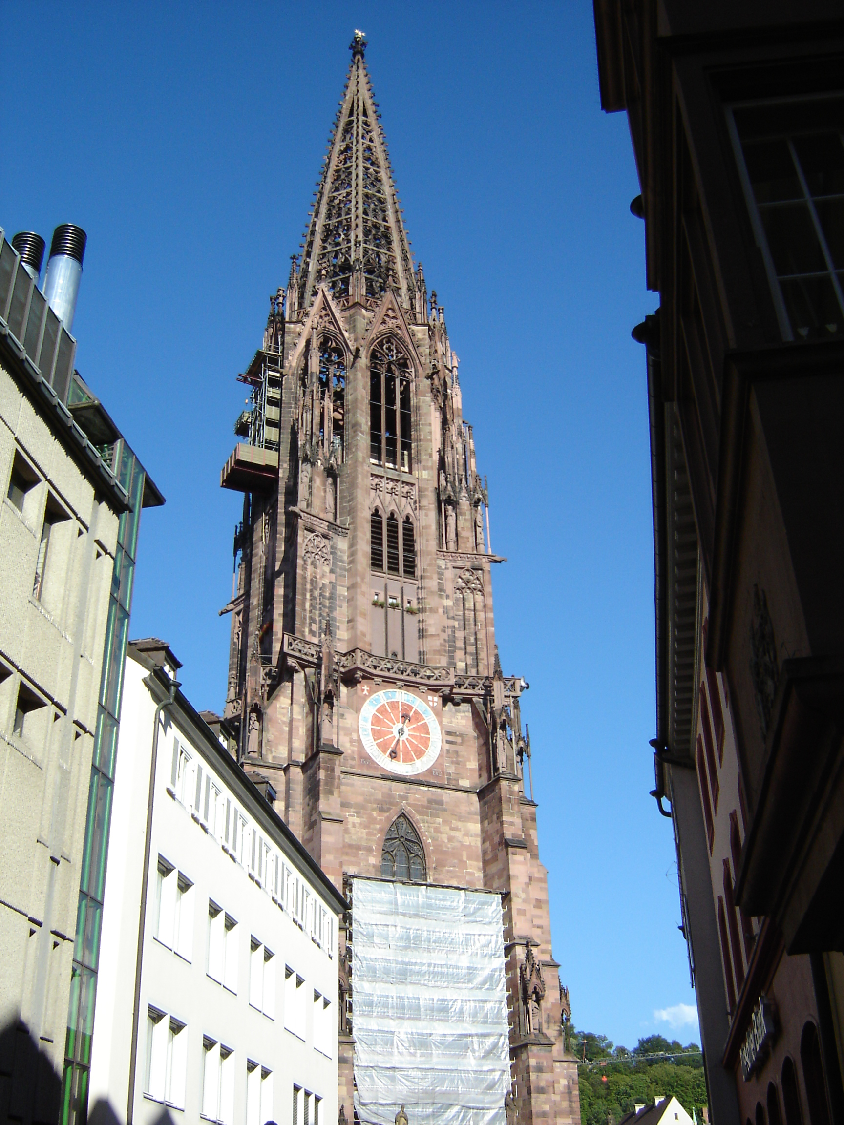 Freiburg im Breisgau: Freiburger Münster